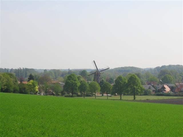 Markelose berg te Markelo. Zelf gemaakte foto. Vrij te grbuiken.